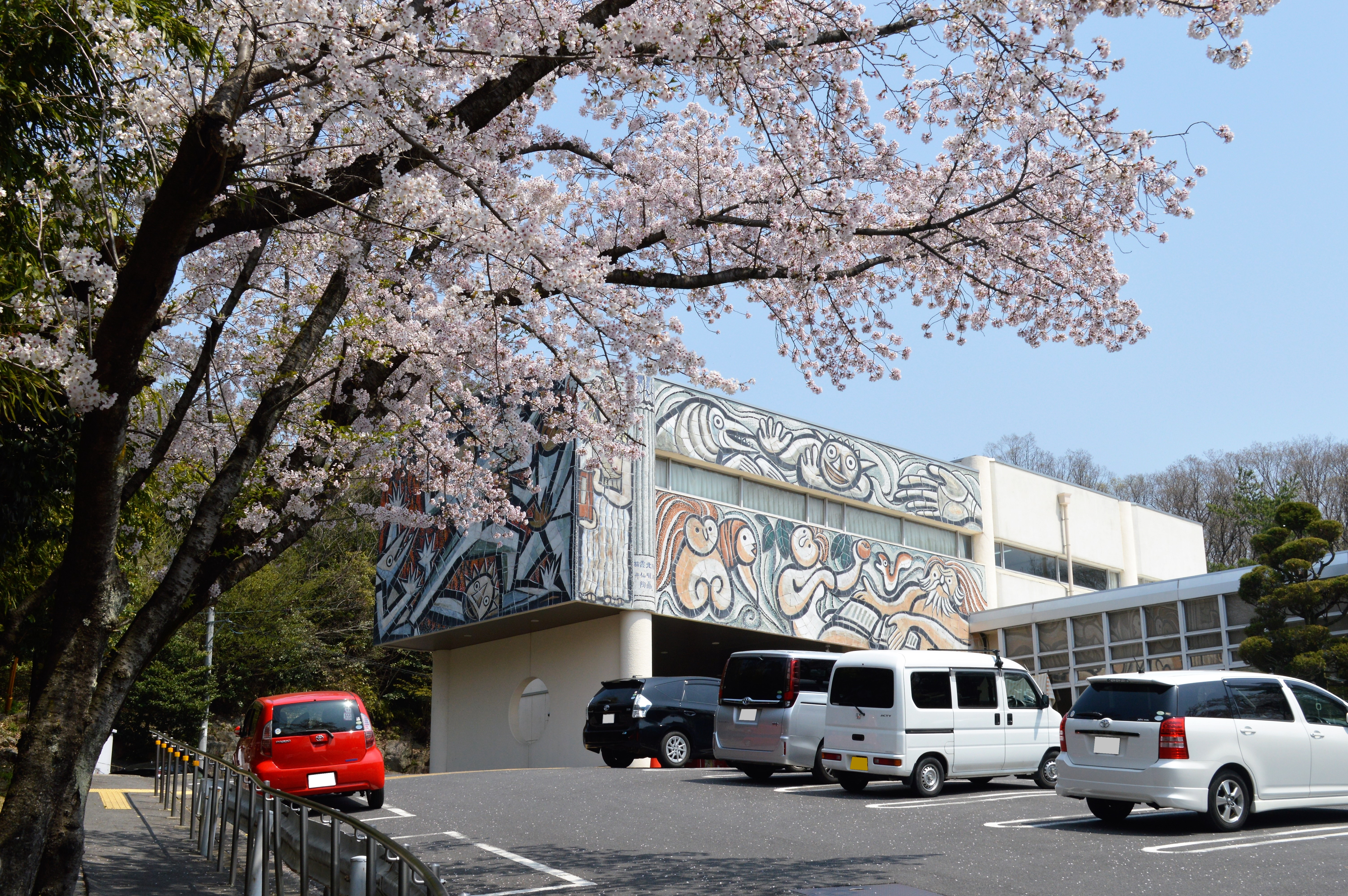 愛知県瀬戸市の瀬戸市立図書館。車のナンバープレート部分は修正してある。